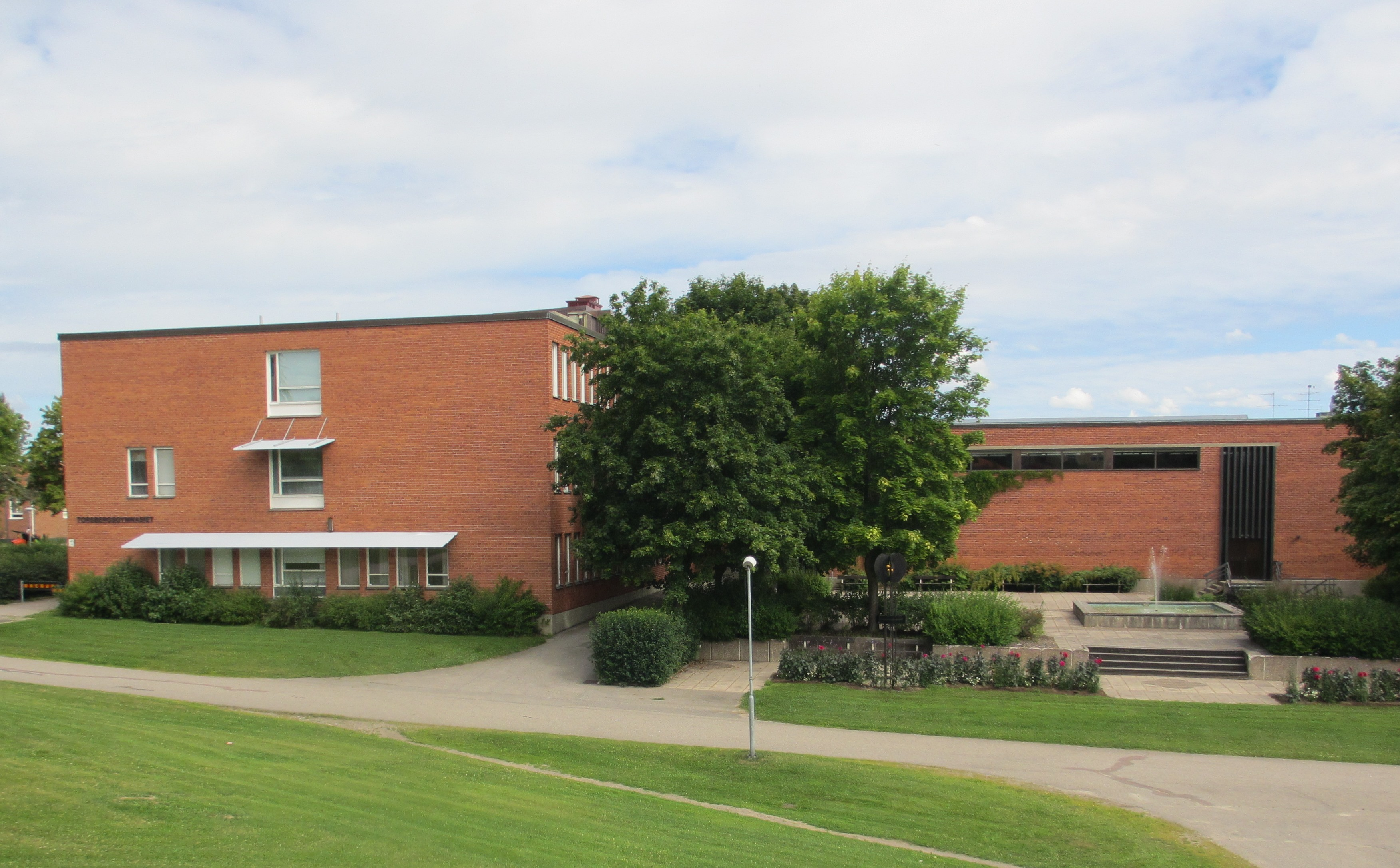 Torsbergsgymnasiet, Bollnäs